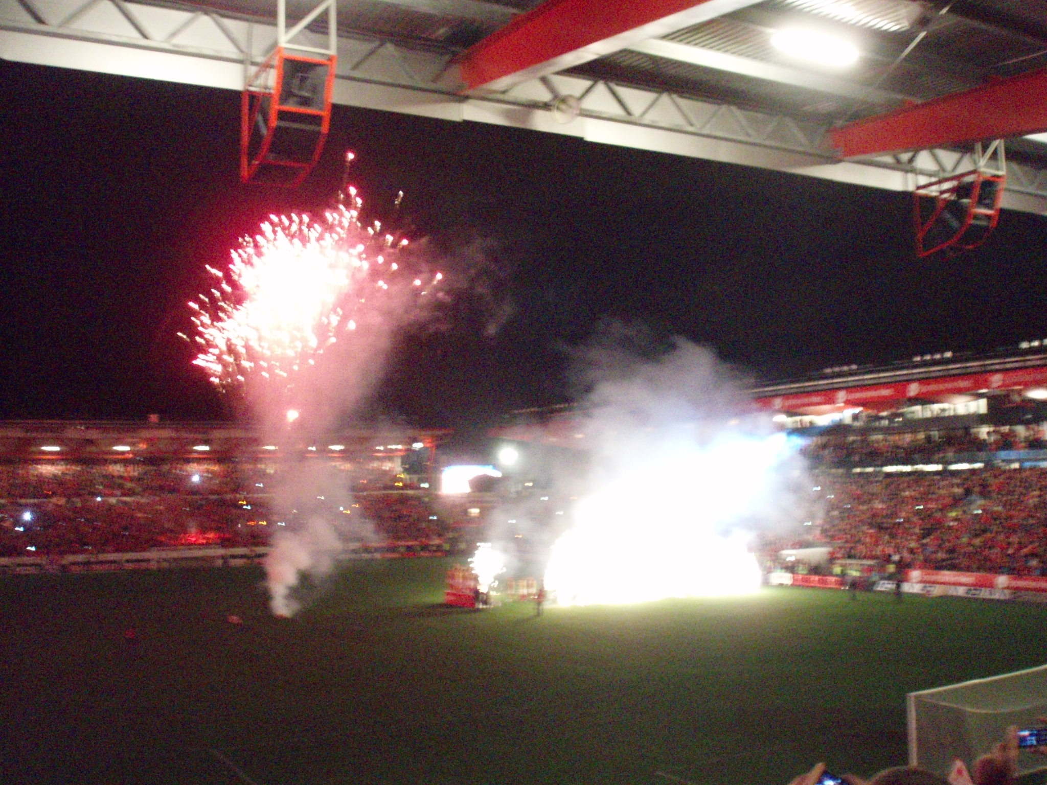 Gull